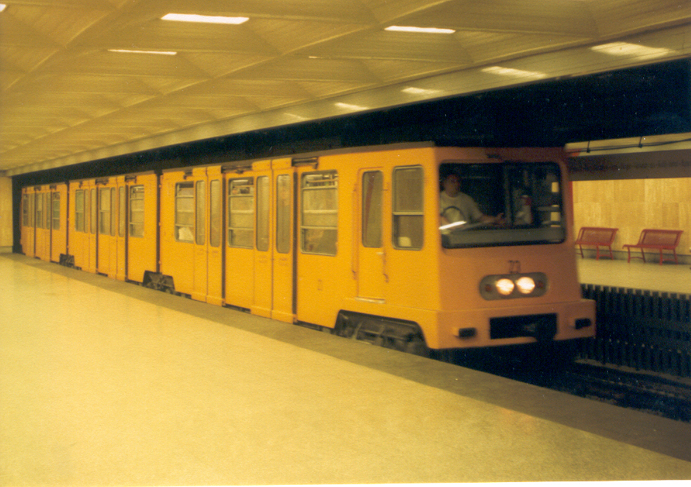 Konečná stanice podzemní dráhy Mexikoi út. Vlak podzemní dráhy Ganz z roku 1973.